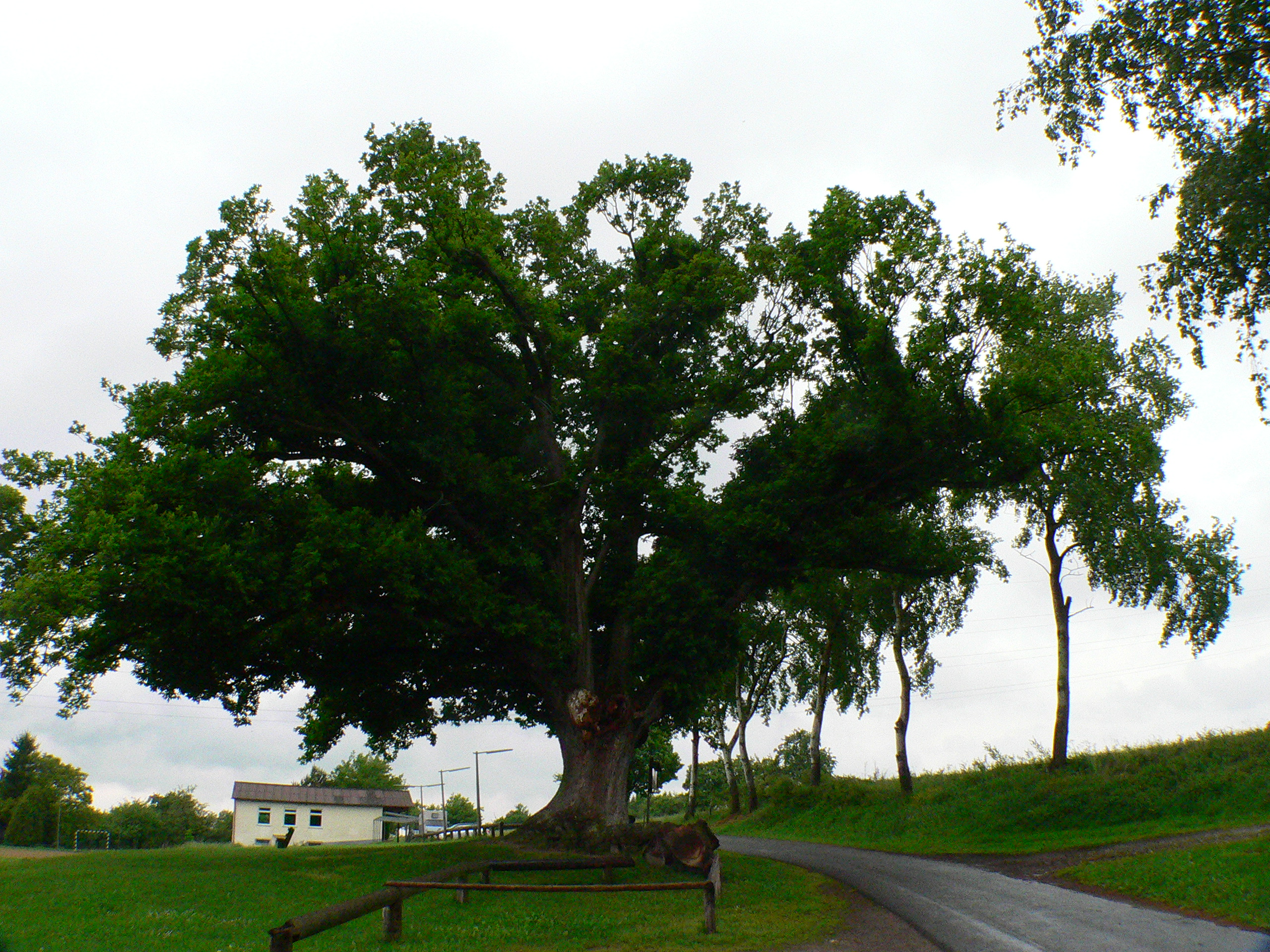 Nanturdenkmal Momarter Eiche (Bad König, Odenwald) - Ostansicht